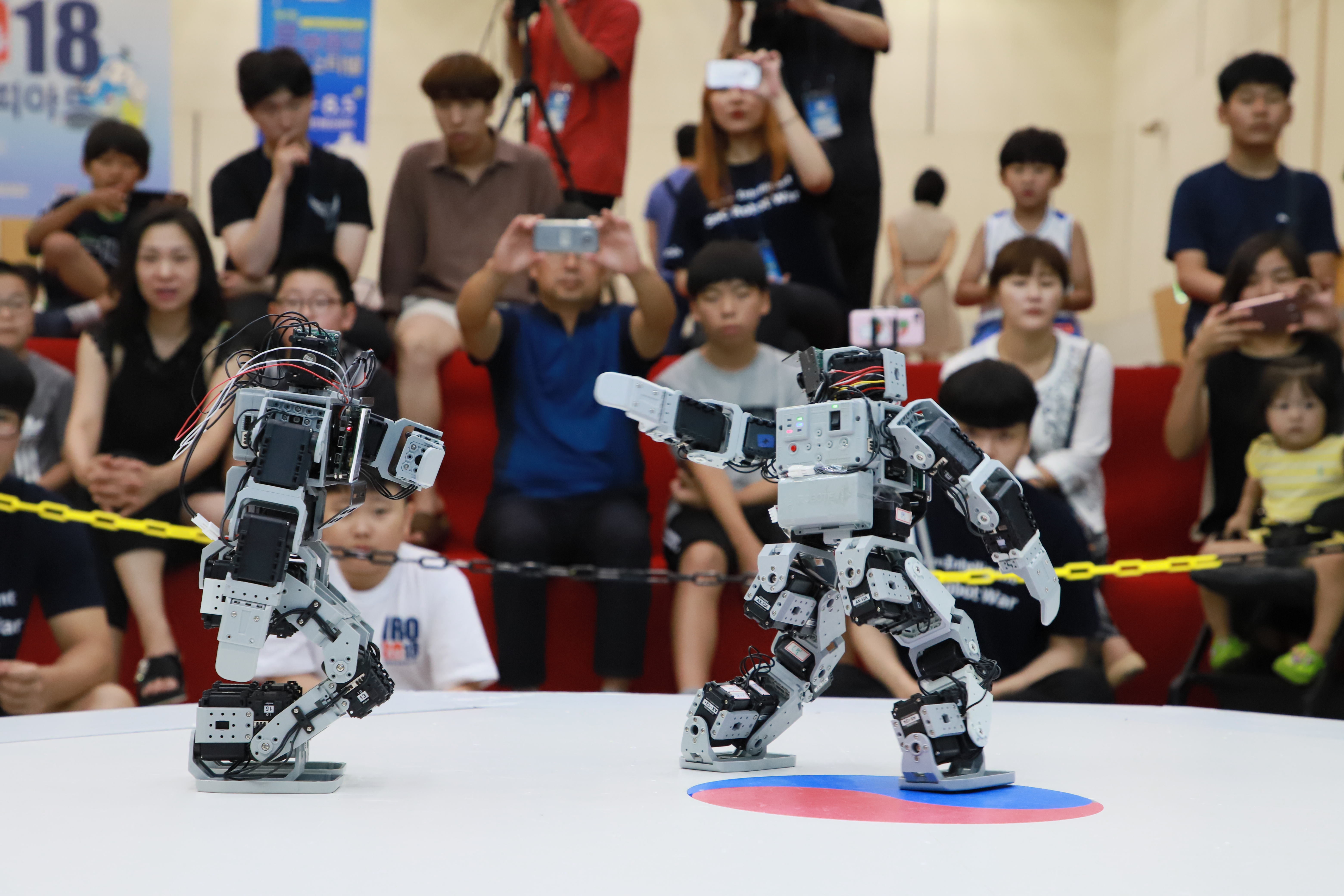 2018 대전로봇융합페스티벌 4